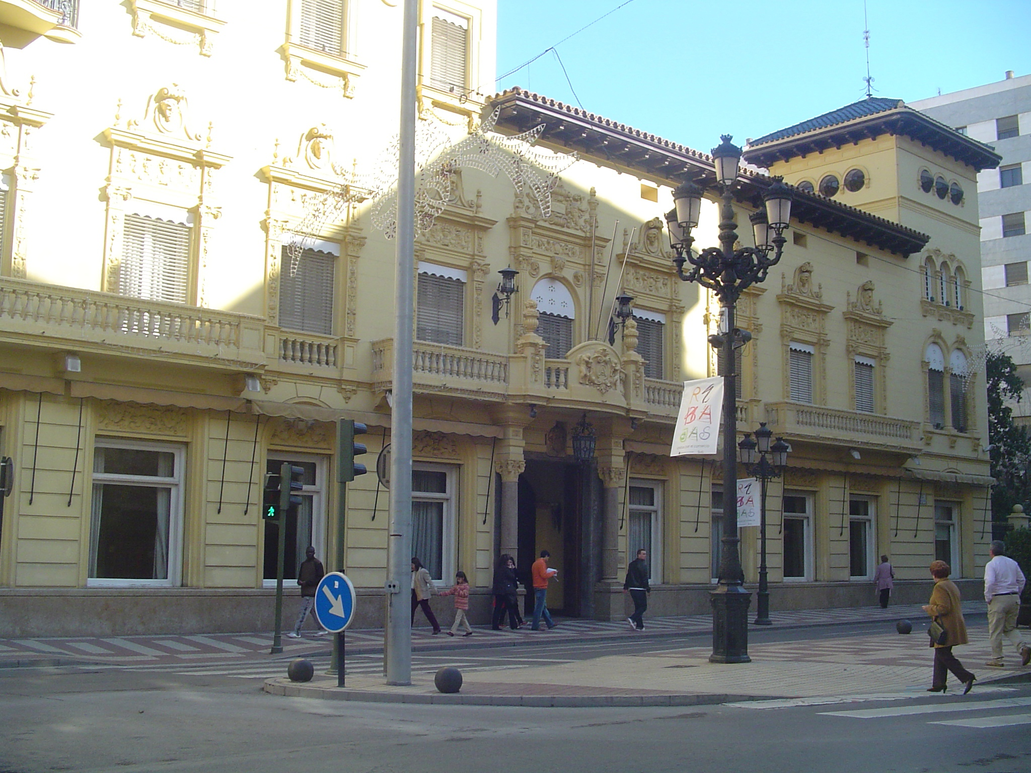 Fachada del Casino Antíguo de la Ciudad de Castellón de la Plana (España)